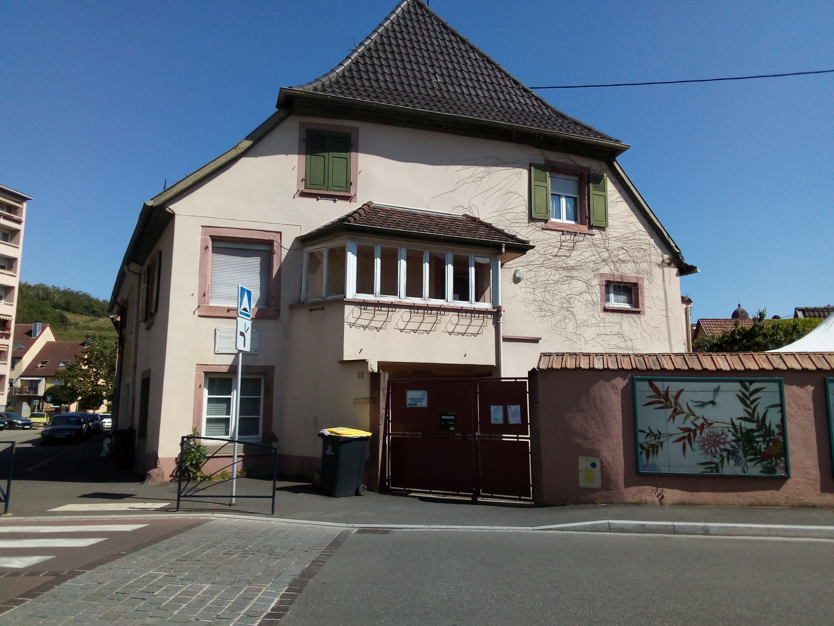 Vue de la maison natale de Théodore Deck à Guebwiller